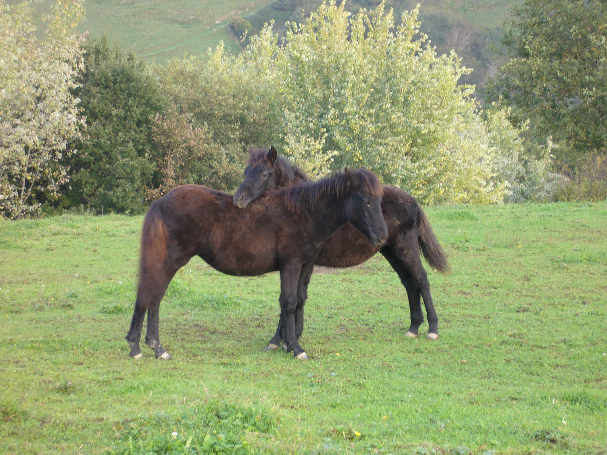 Bi pottoka moxal